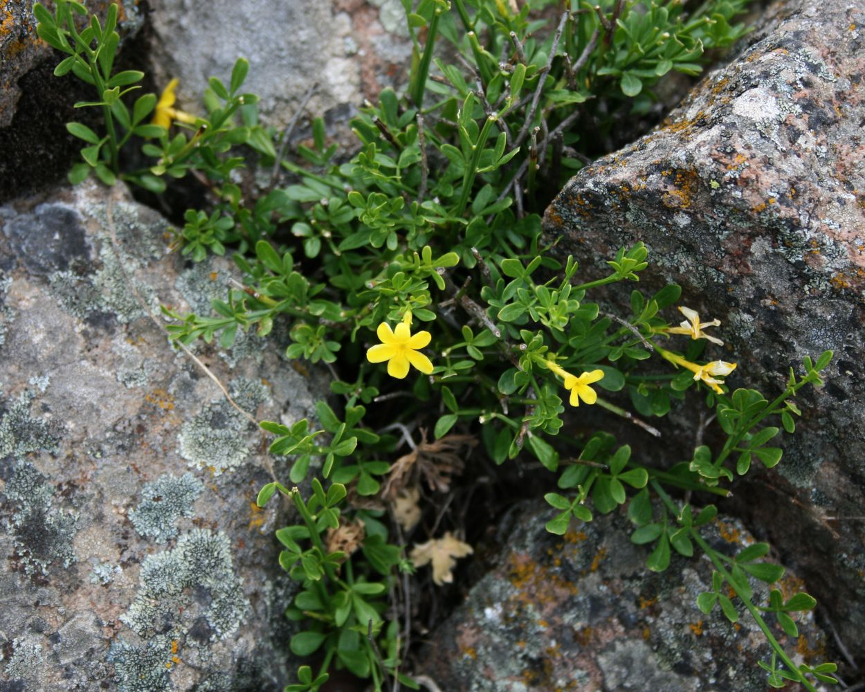 Jasminum fruticans, Ölbaumgewächse (Oleaceae) - Türkei/Türkiye/Turkey: Prov. Bolu/Bolu ili, Köroğlu Dağları, an der Straße ca. 4,5 km WNW Karaköy, WNW Kıbrıscık, ca. 1250 m s.m.